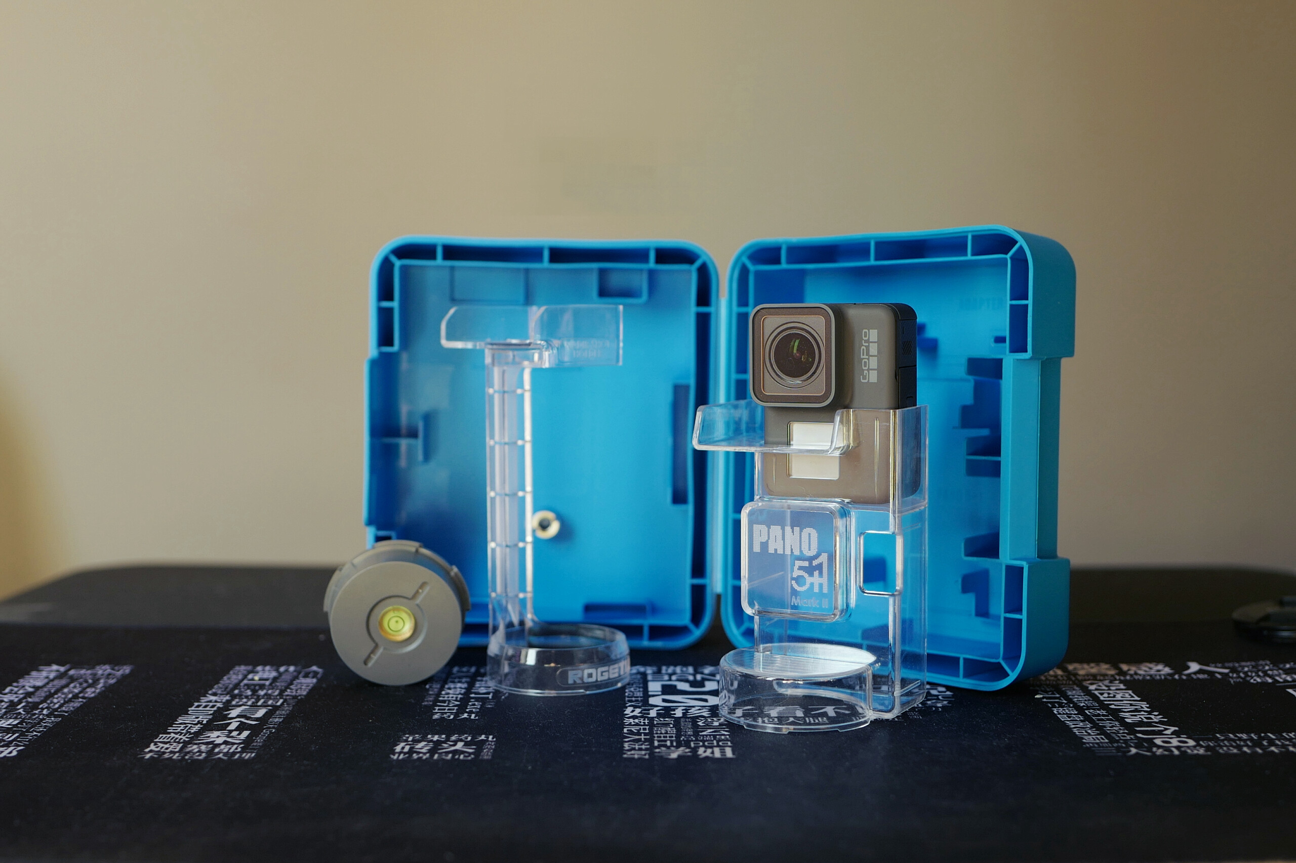 Pano5+1 Mark II 套装的合影，GoPro Hero 5 不在套装内。